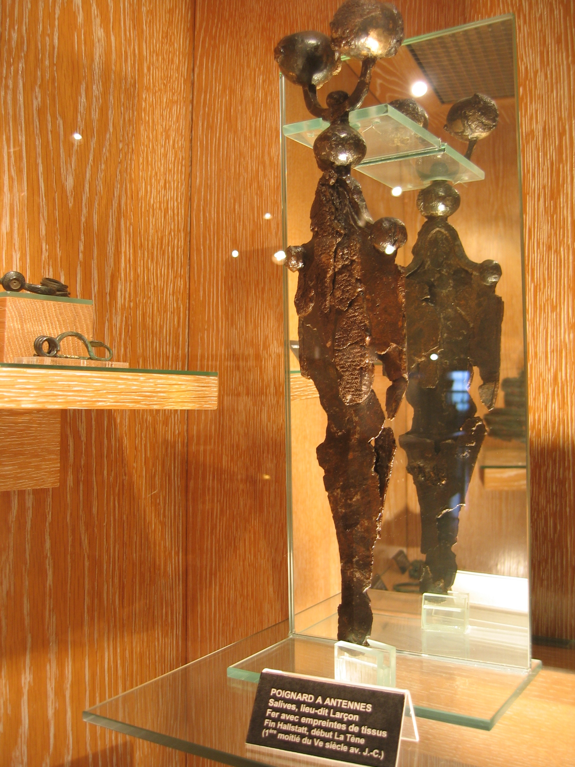 Poignard en bronze musée archéologique Dijon France